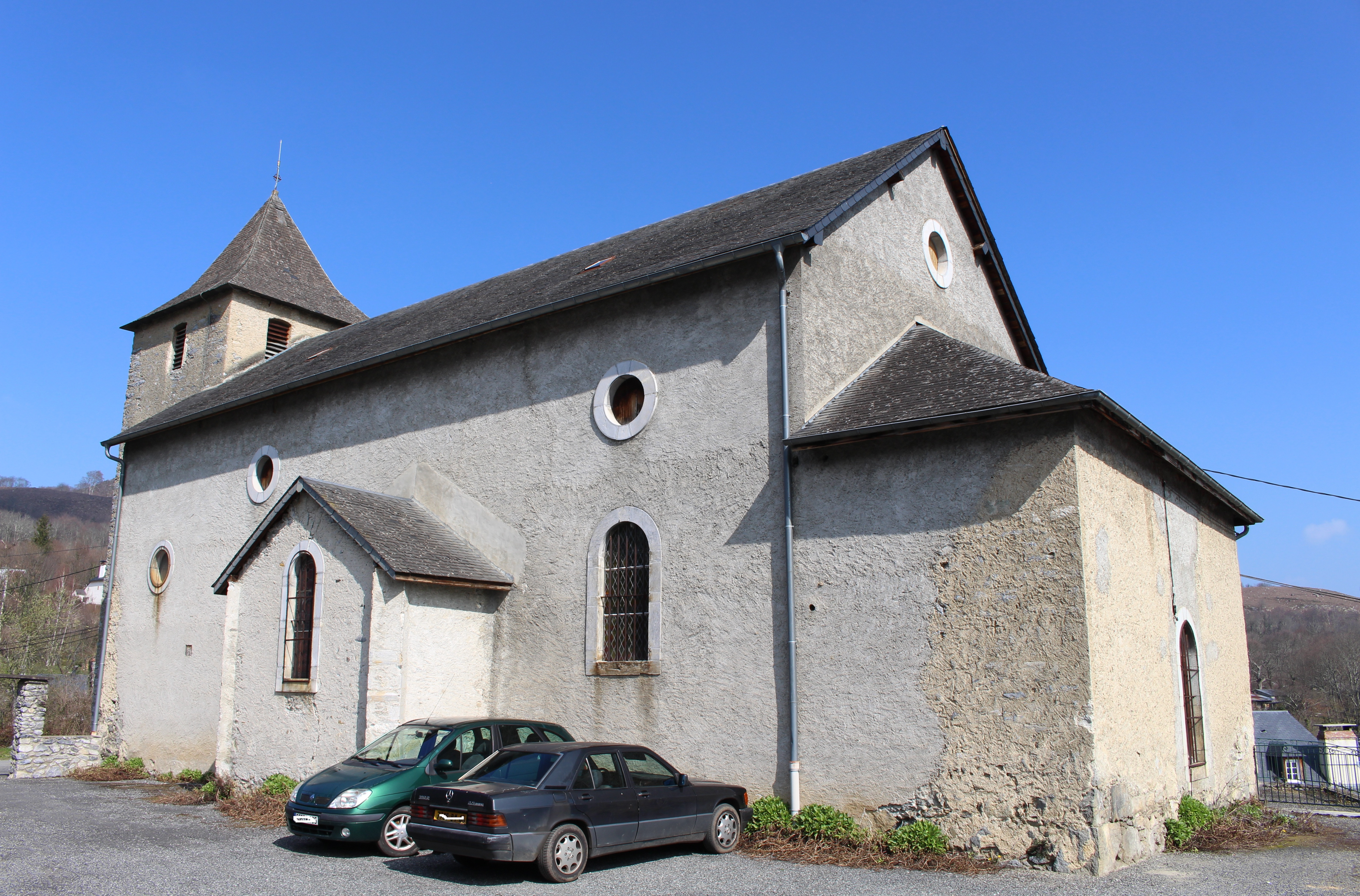 Église Saint Saturnin d'Omex (Hautes-Pyrénées)